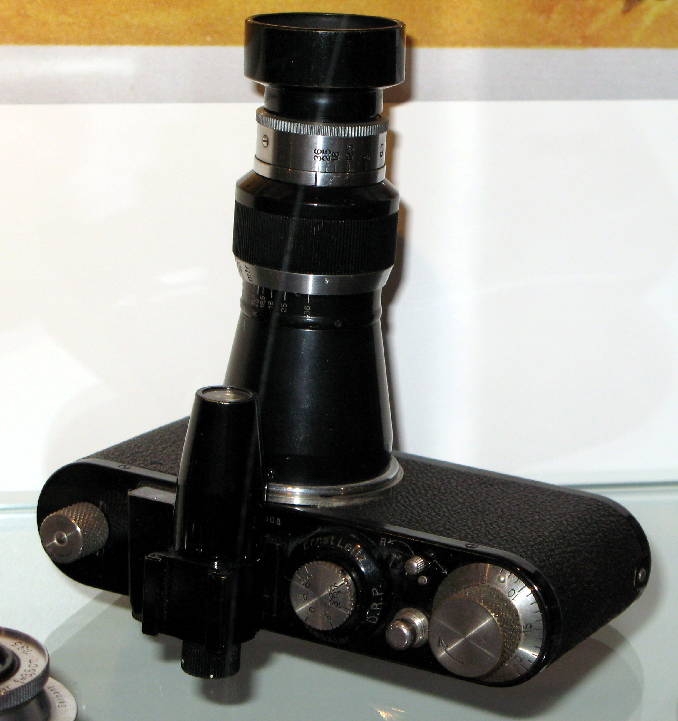 Leica I(C) mit Wechselobjektiv Leitz Elmar 1:6,3 F = 105 mm (1932)